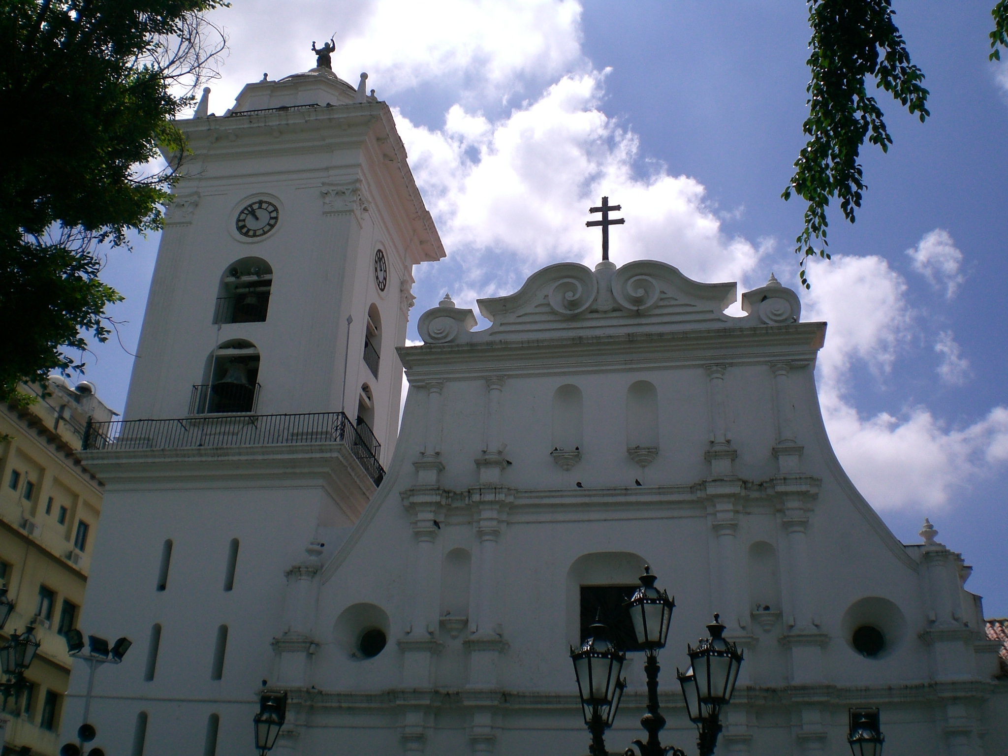 Caracas Cathedral, Caracas, Venezuela